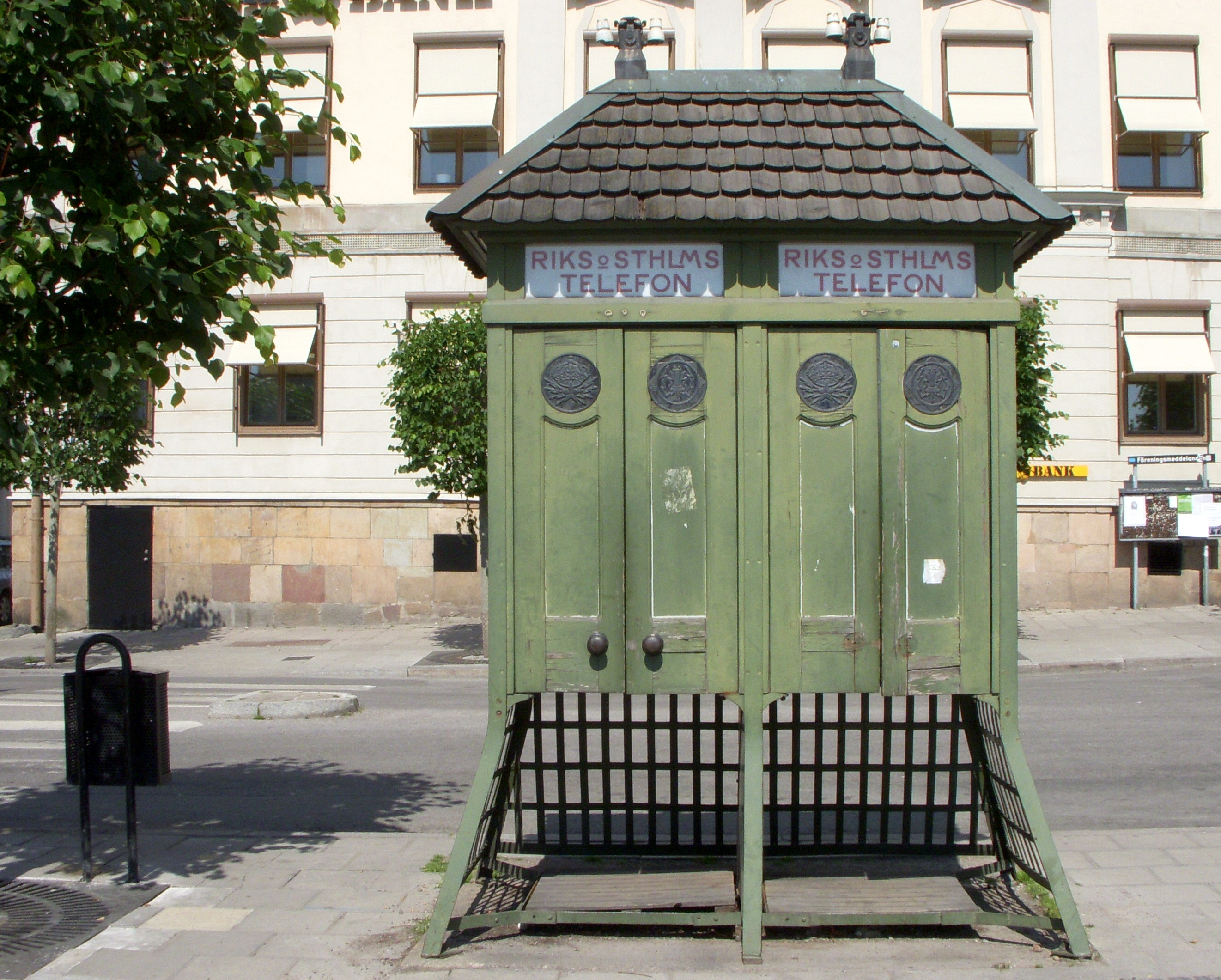 Dubbel-telefonkiosk på Kornhamnstorg, Stockholm